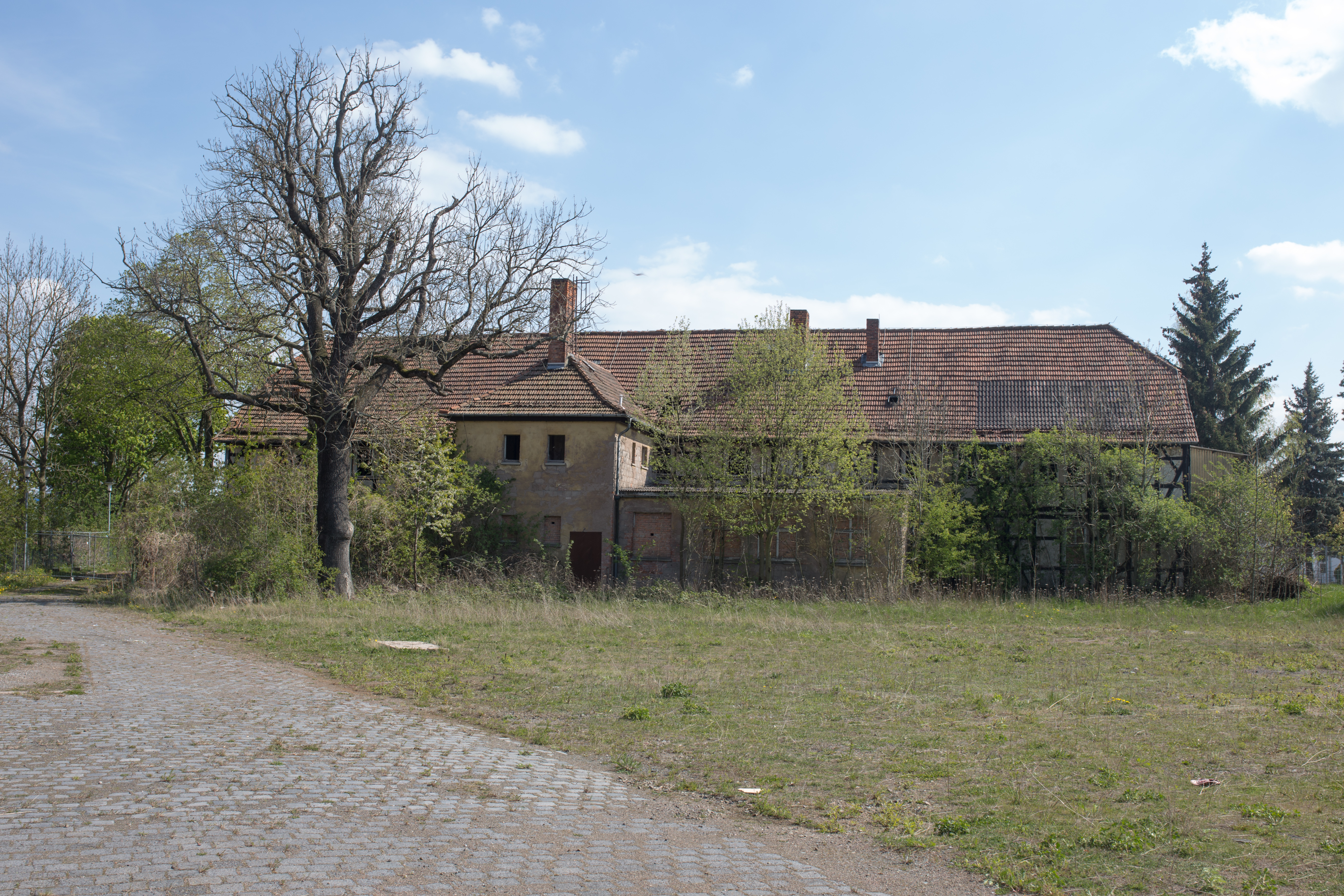 Der Siechenhof wurde im Jahr 1284 als Unterkunft für verarmte und kranke Menschen errichtet und zusammen mit der Cyriaci-Kapelle fertiggestellt. Bis 1991 war das Gebäude ein Altenheim. NordhausenWiki